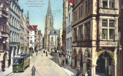 Postkarte des Prinzipalmarkt von Münster Westfalen, mit Olivefarbenen Straßenbahn Triebwagen der Stadtwerke Münster, 1919. Hinweis: Das Bild ist retouchiert. Altersbedingte Schmierereien und Beschädigungen der Postkarte sind elektronisch entfernt.